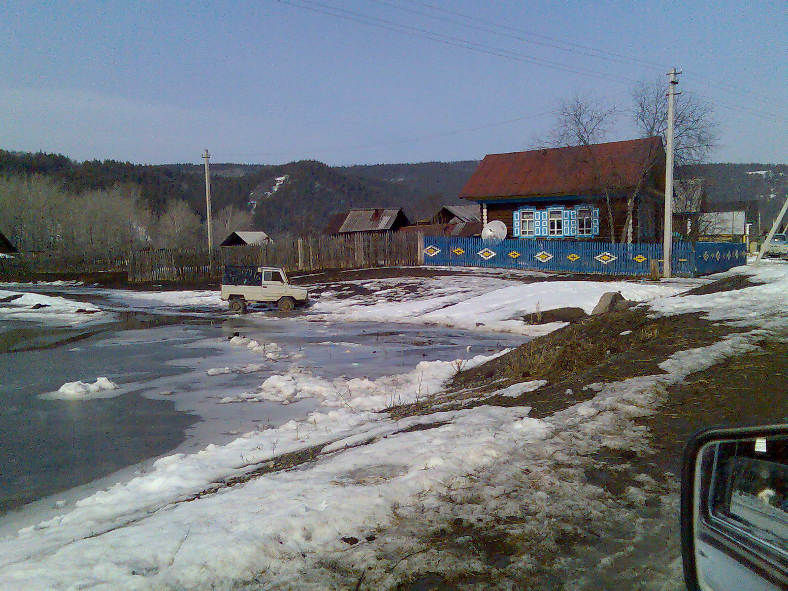 В Атиково